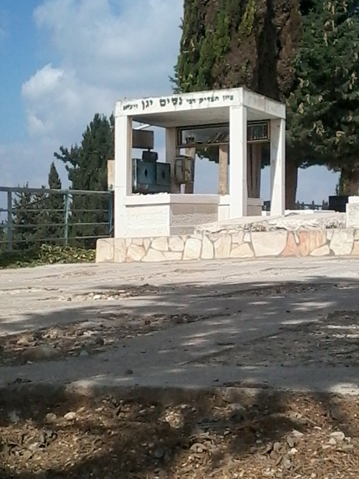 קבר הרב נסים יגן בהר המנוחות בירושלים